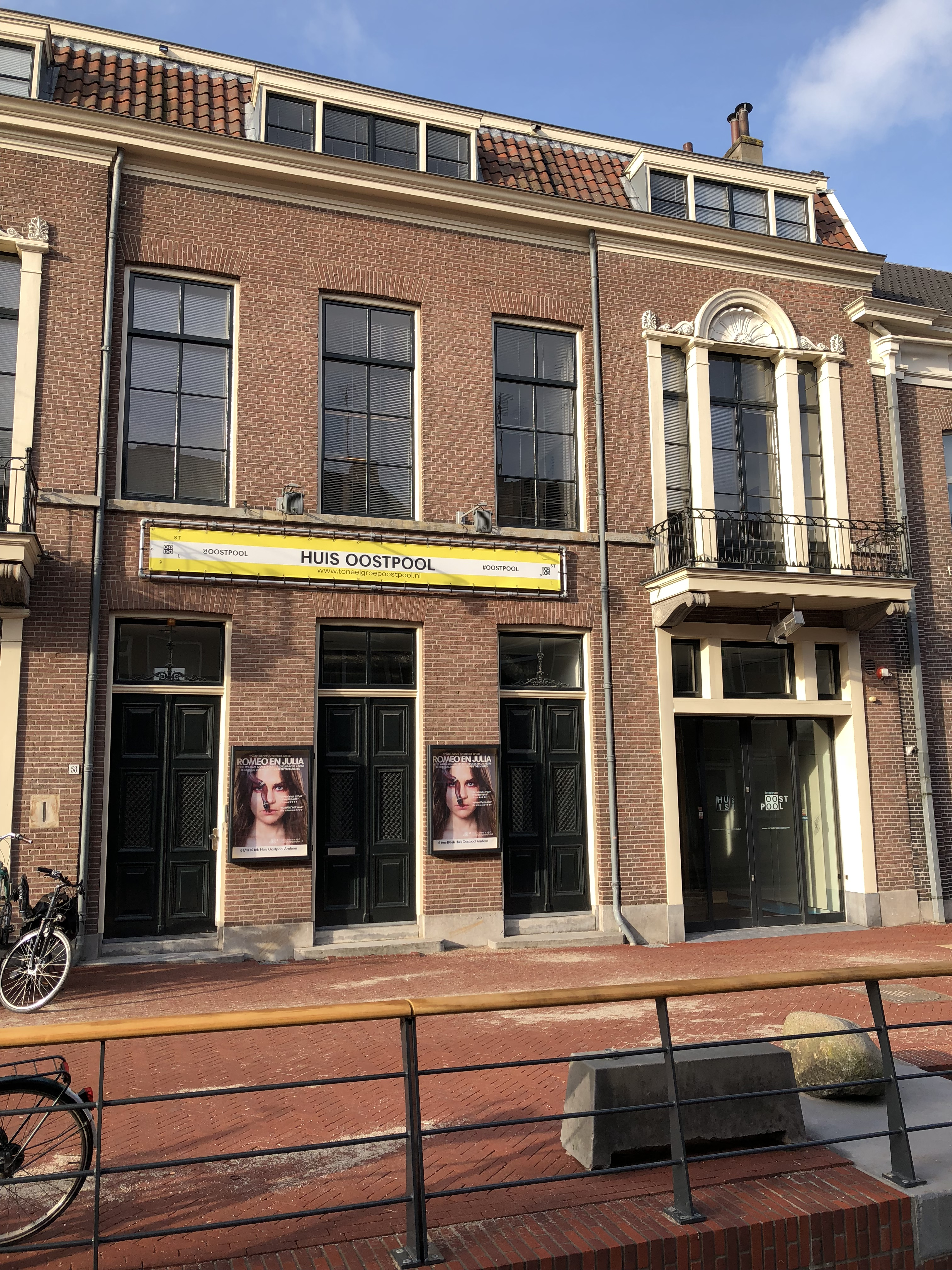 Toneelgroep Oostpool